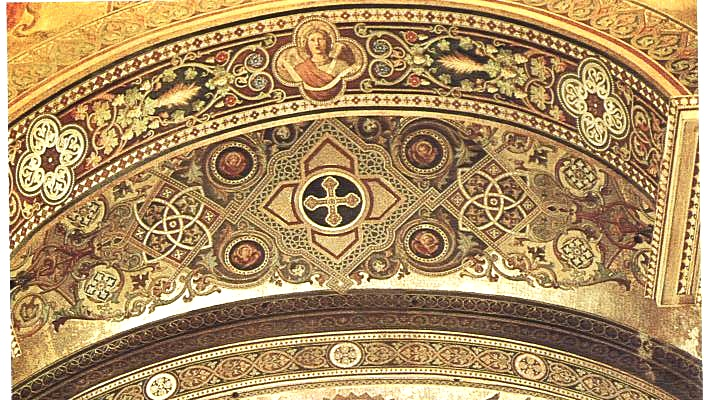 Dekorationsmalerei im Speyerer Dom, von Joseph Schwarzmann, 1850